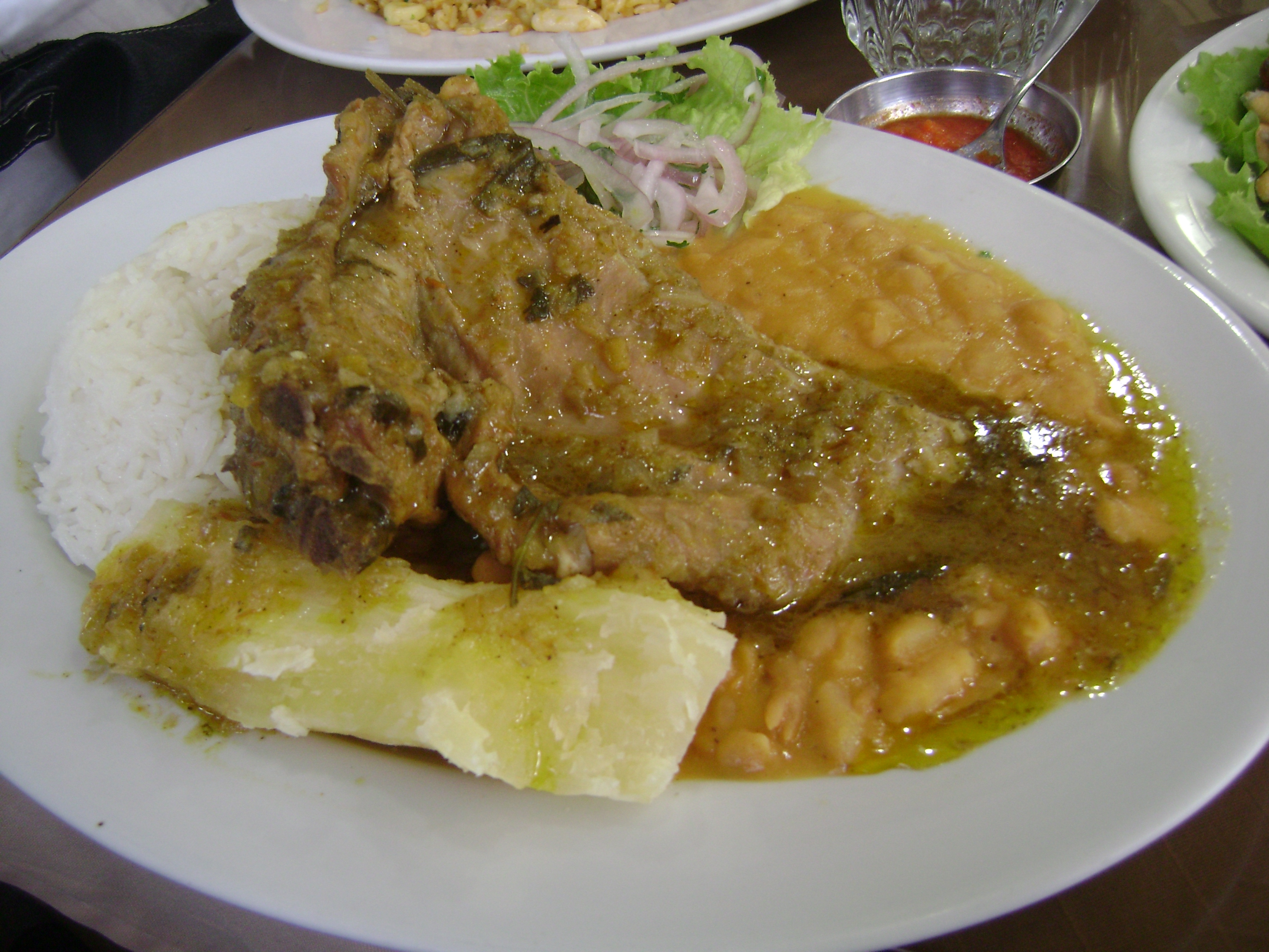 Un plato de Seco de Cabrito servido con frejoles y arroz blanco.